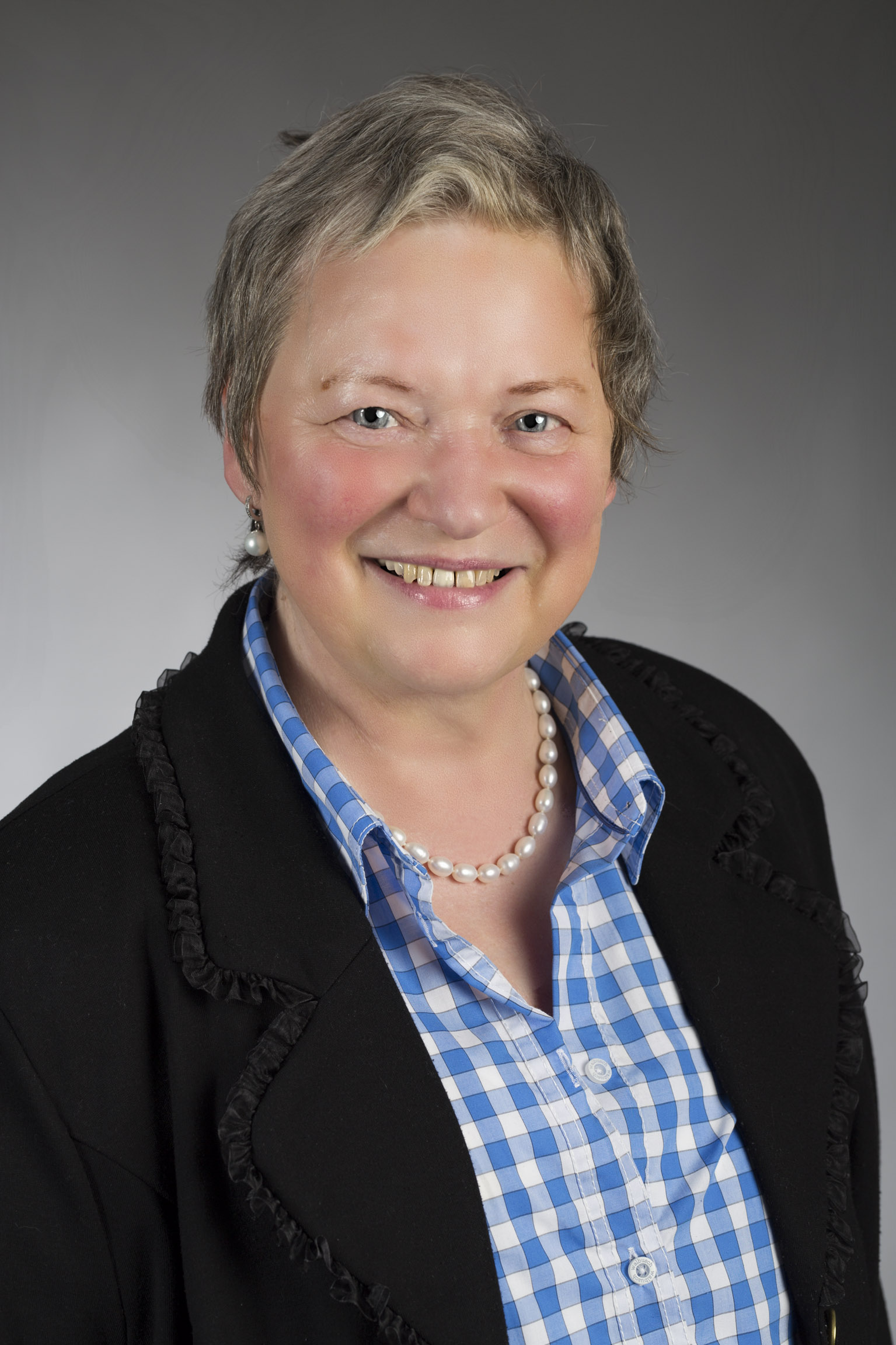 Renate Pepper, Landeszentrale für Medien und Kommunikation